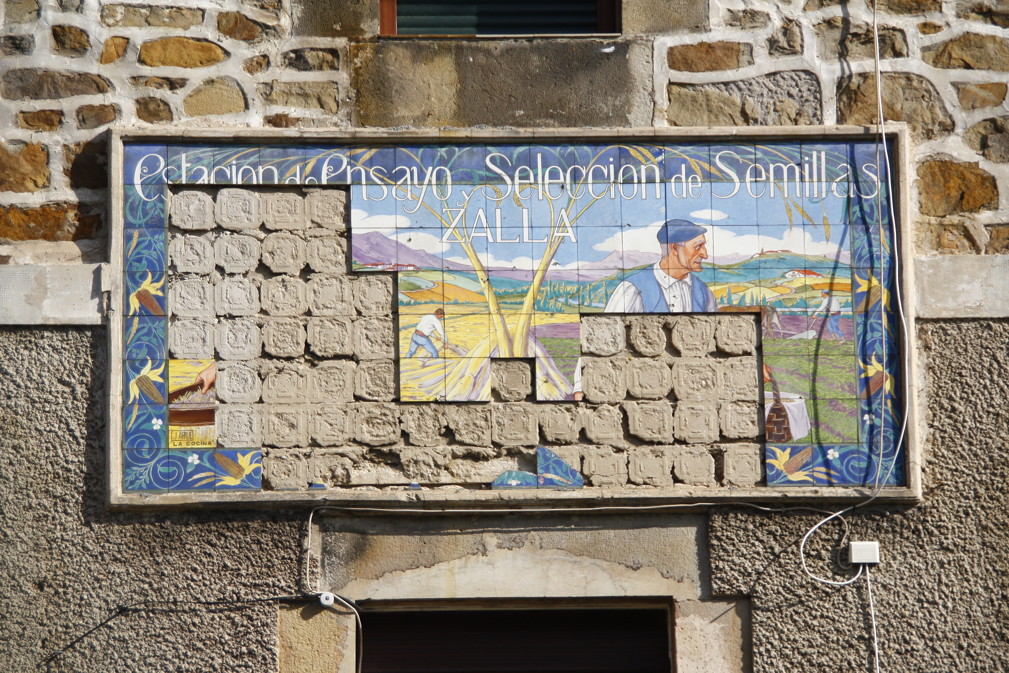 Bizkaiko Foru Aldundiak Zallan kokatua duen frutagintza estazioaren kanpoko aldean dagoen baserri bateko azulejuz egindako murala. Muralaren ezkerrean egilearen sinadura ageri da: "J. Arrue".